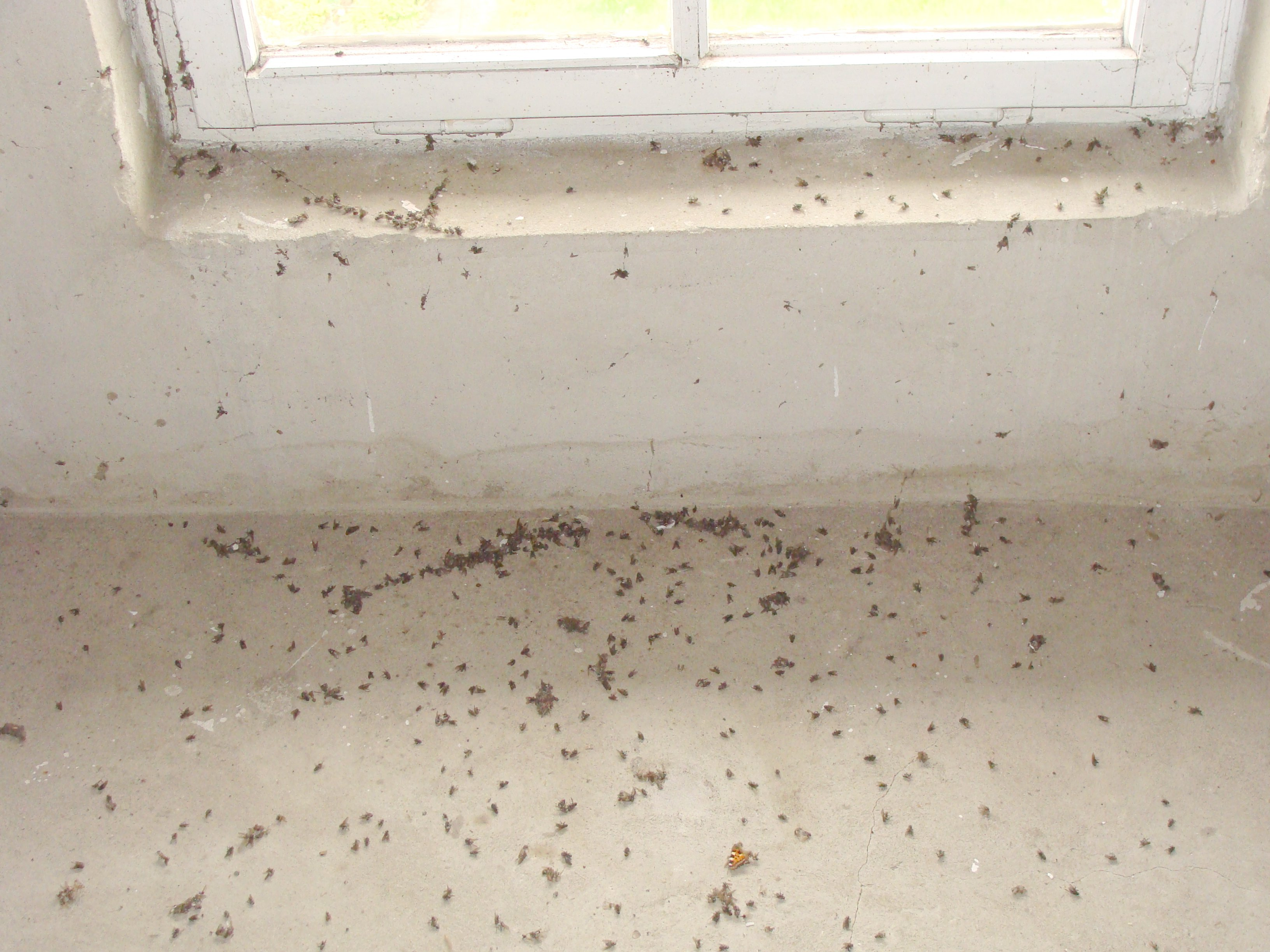 Hibernakulum - pułapka